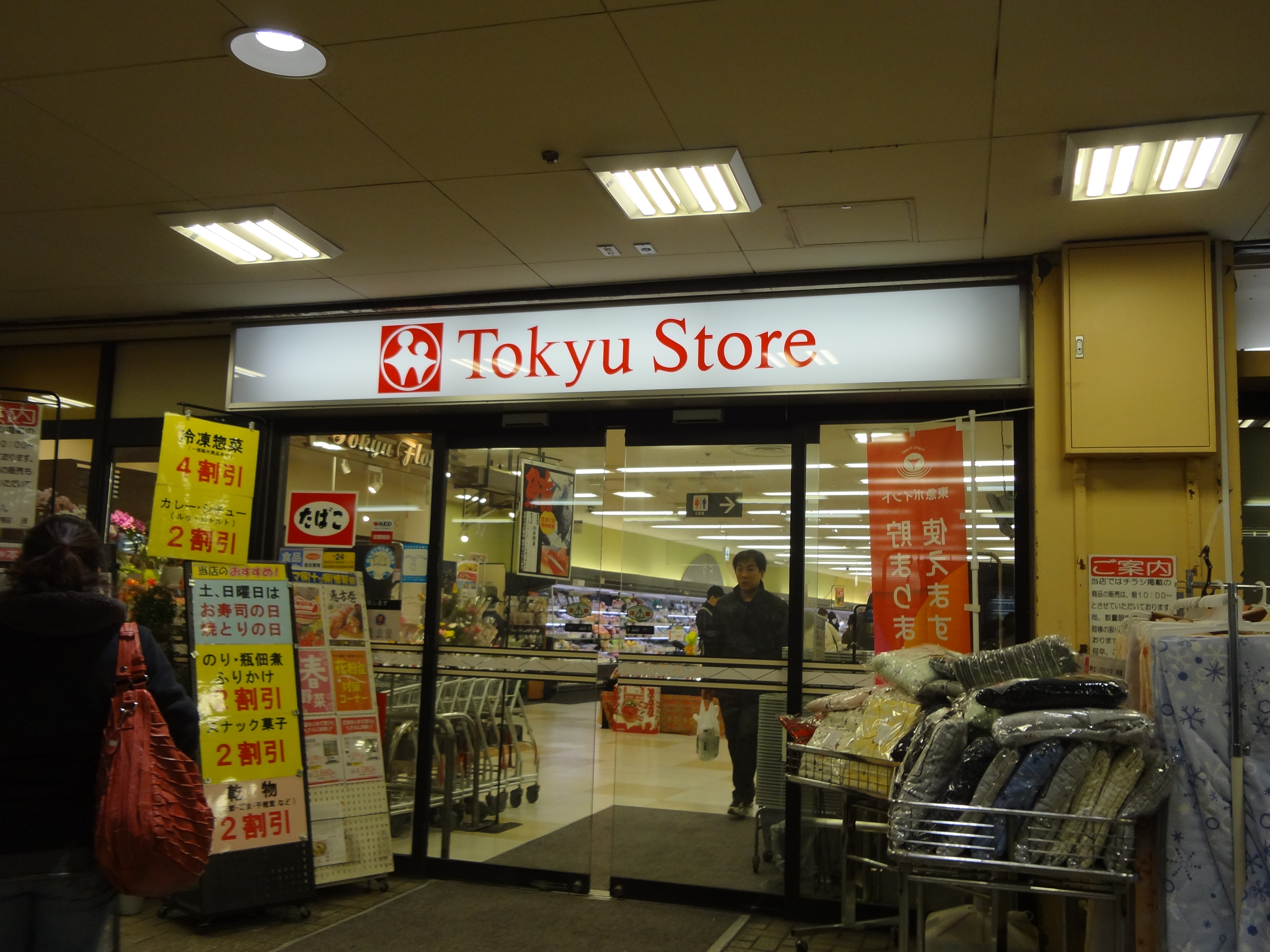 東急ストア 駅構内（2016年1月23日）